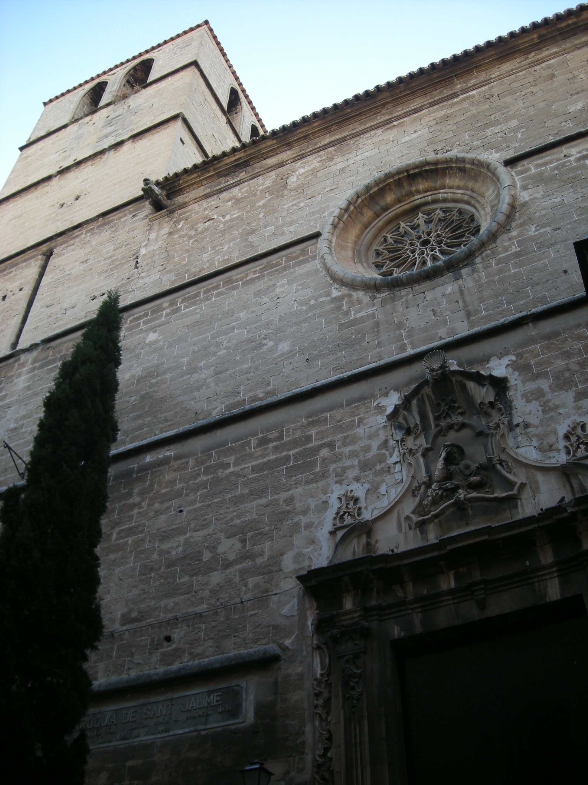 Església de Sant Jaume. Carrer de Sant Jaume, 10. Palma. Mallorca